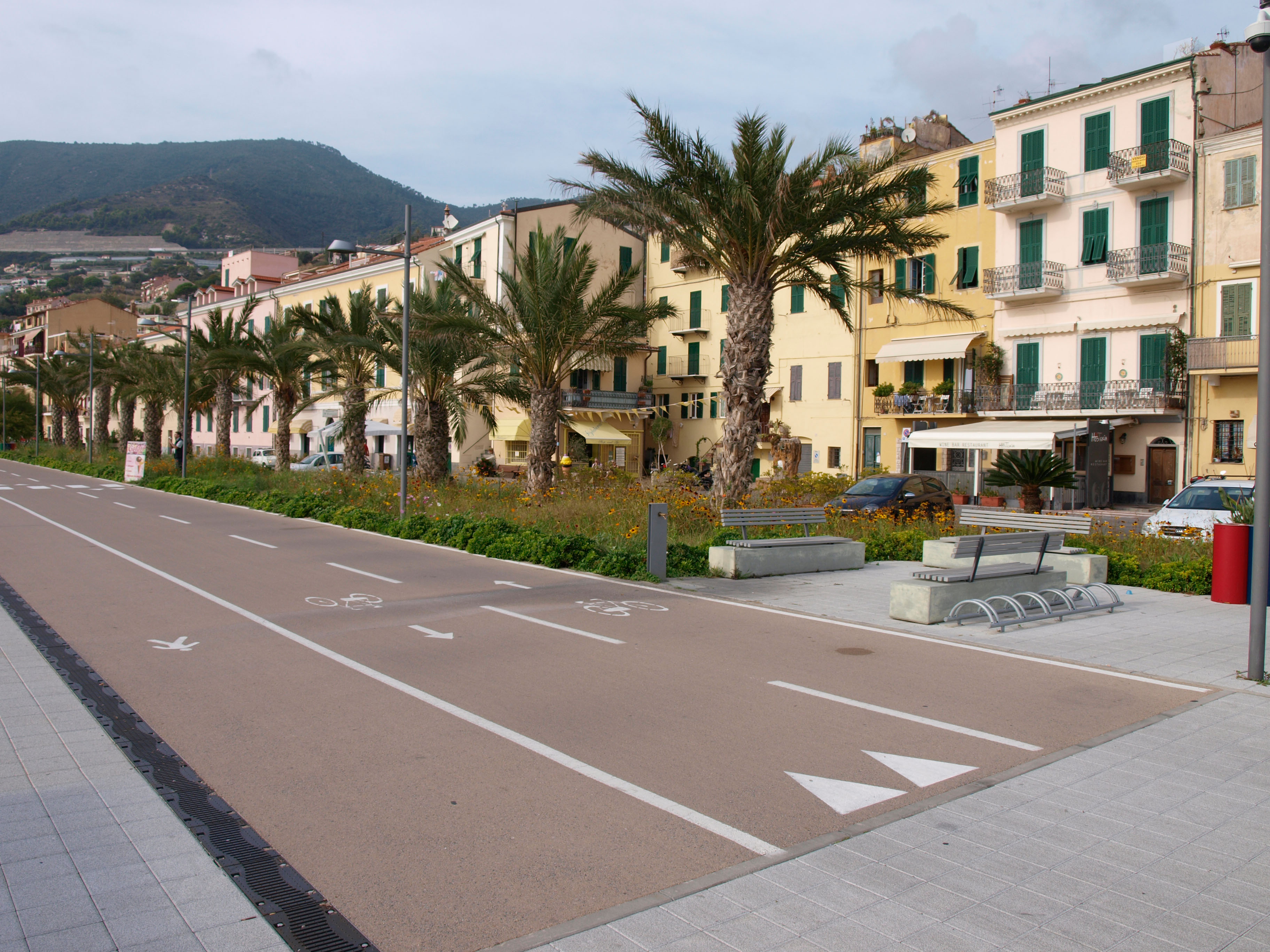 18014 Ospedaletti IM, Italy